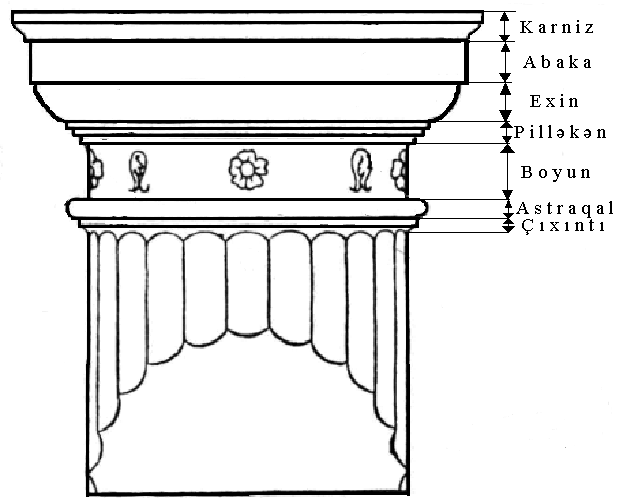 Sadə kapiteli hissələri